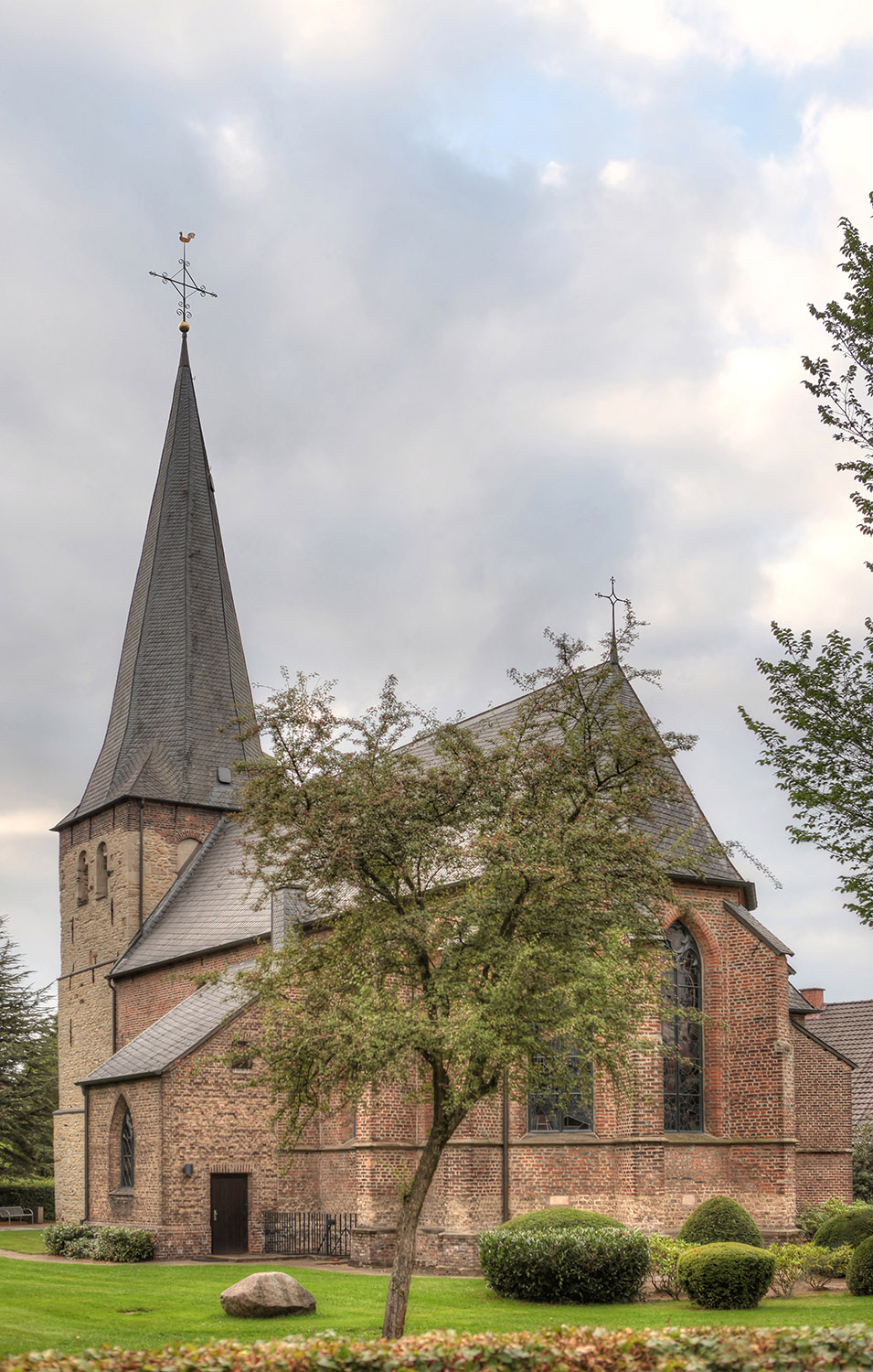 Evangelische Kirche Drevenack 01